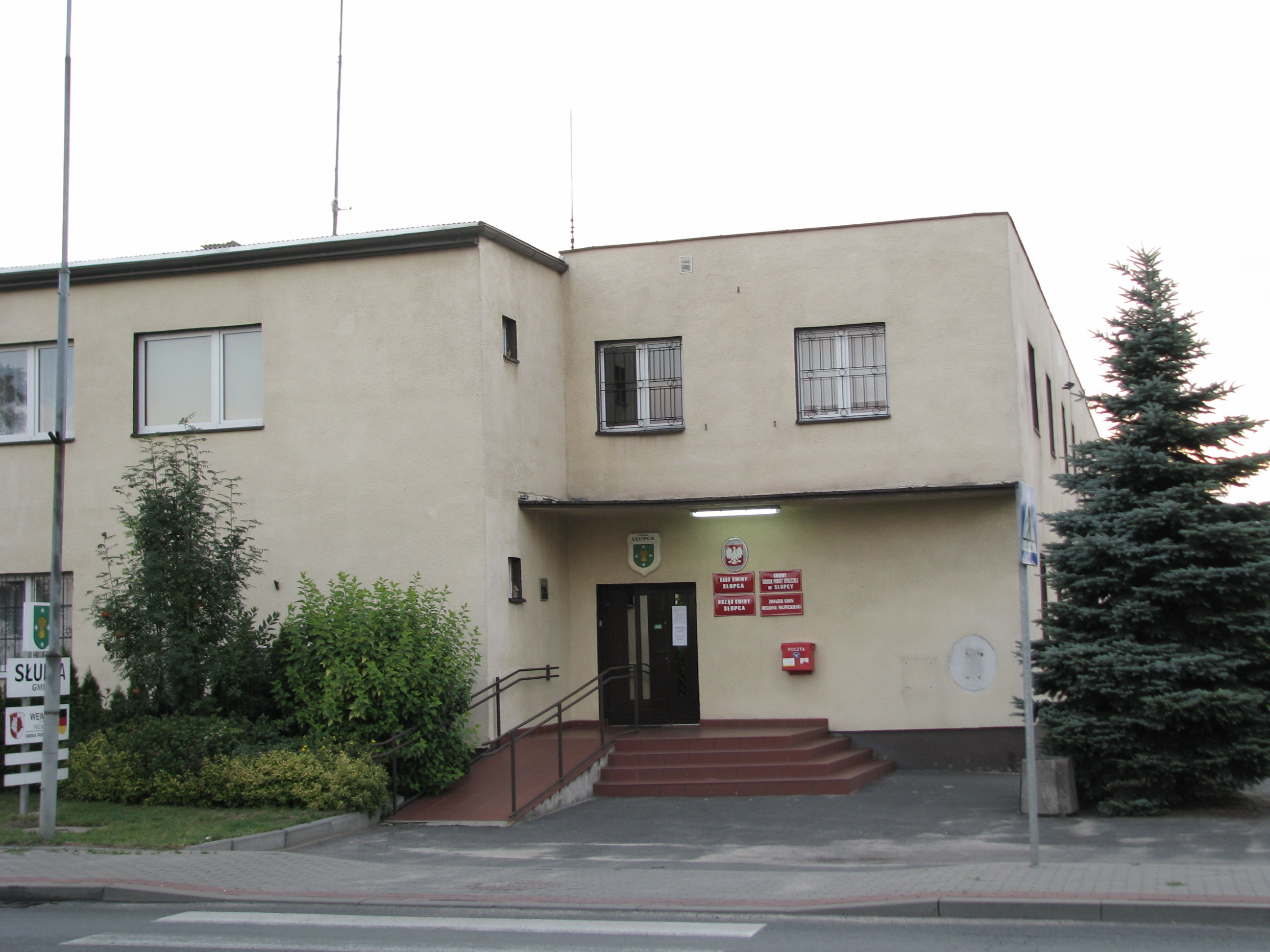 Budynek Urzędu Gminy Słupca, ul. Sienkiewicza 16